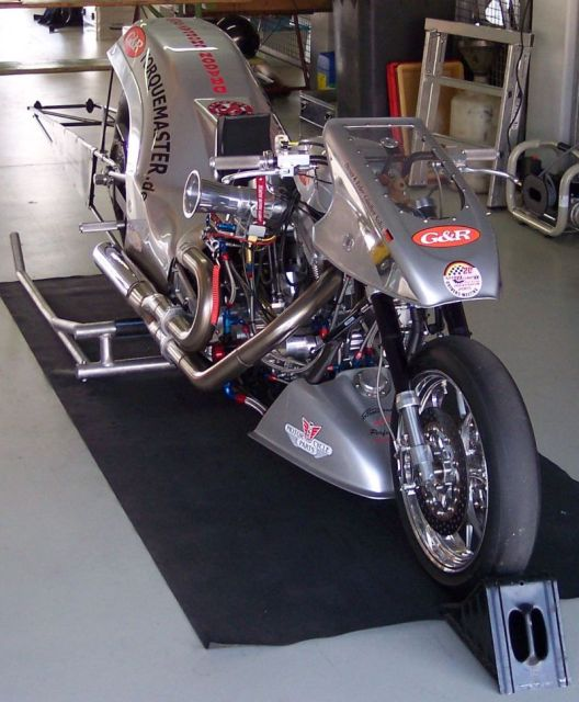 Super Twin Top Fuel Bike (STTF) auf Harley-V2-Basis. - Aufgenommen bei den Nitrolympx 2005. - Driver: Günther Sohn (GER)